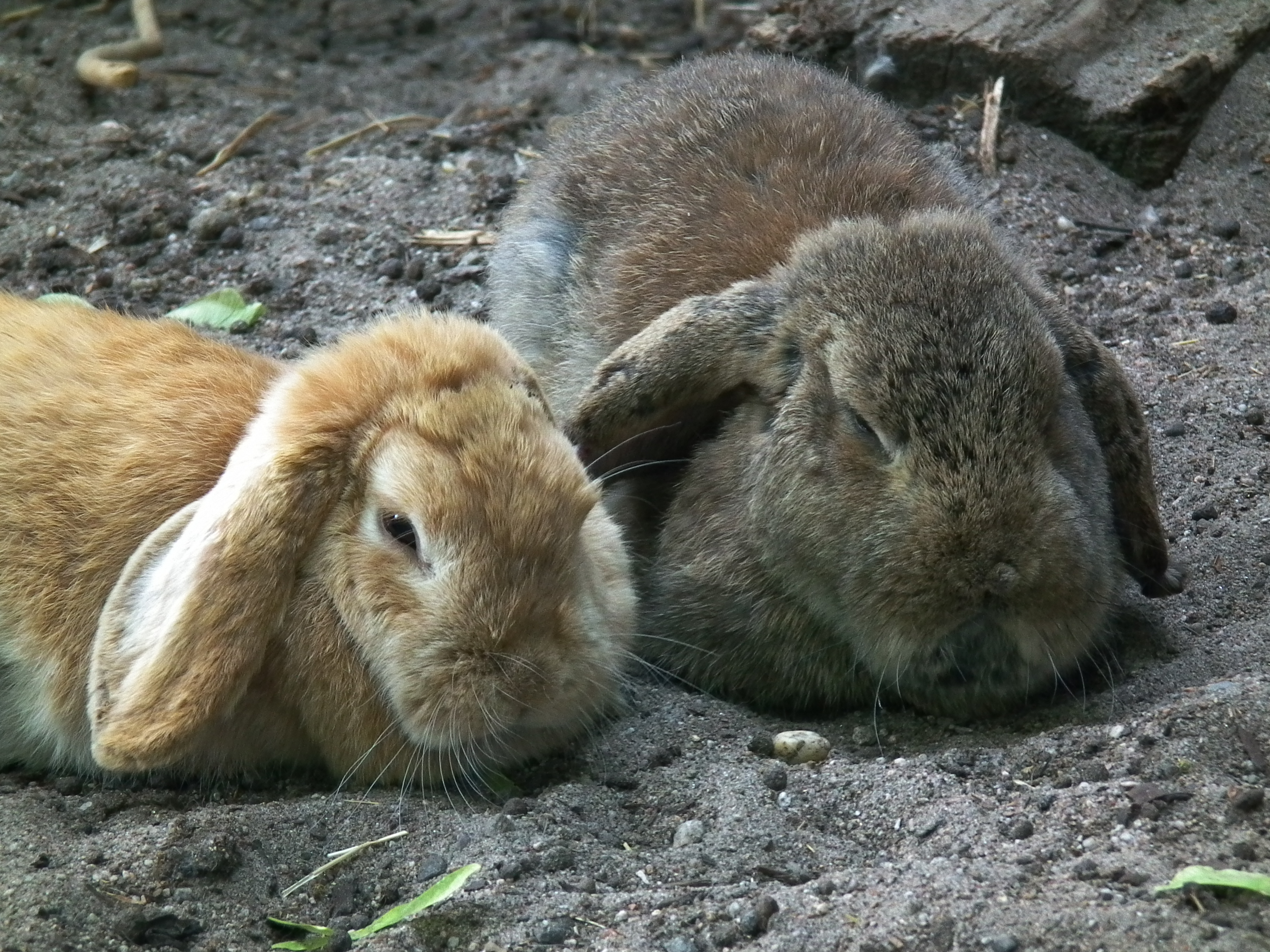 Zwei Kaninchen der Rasse "Deutsche Widder", fotografiert im Tierpark Rheingönheim (Rheinland-Pfalz, Deutschland)